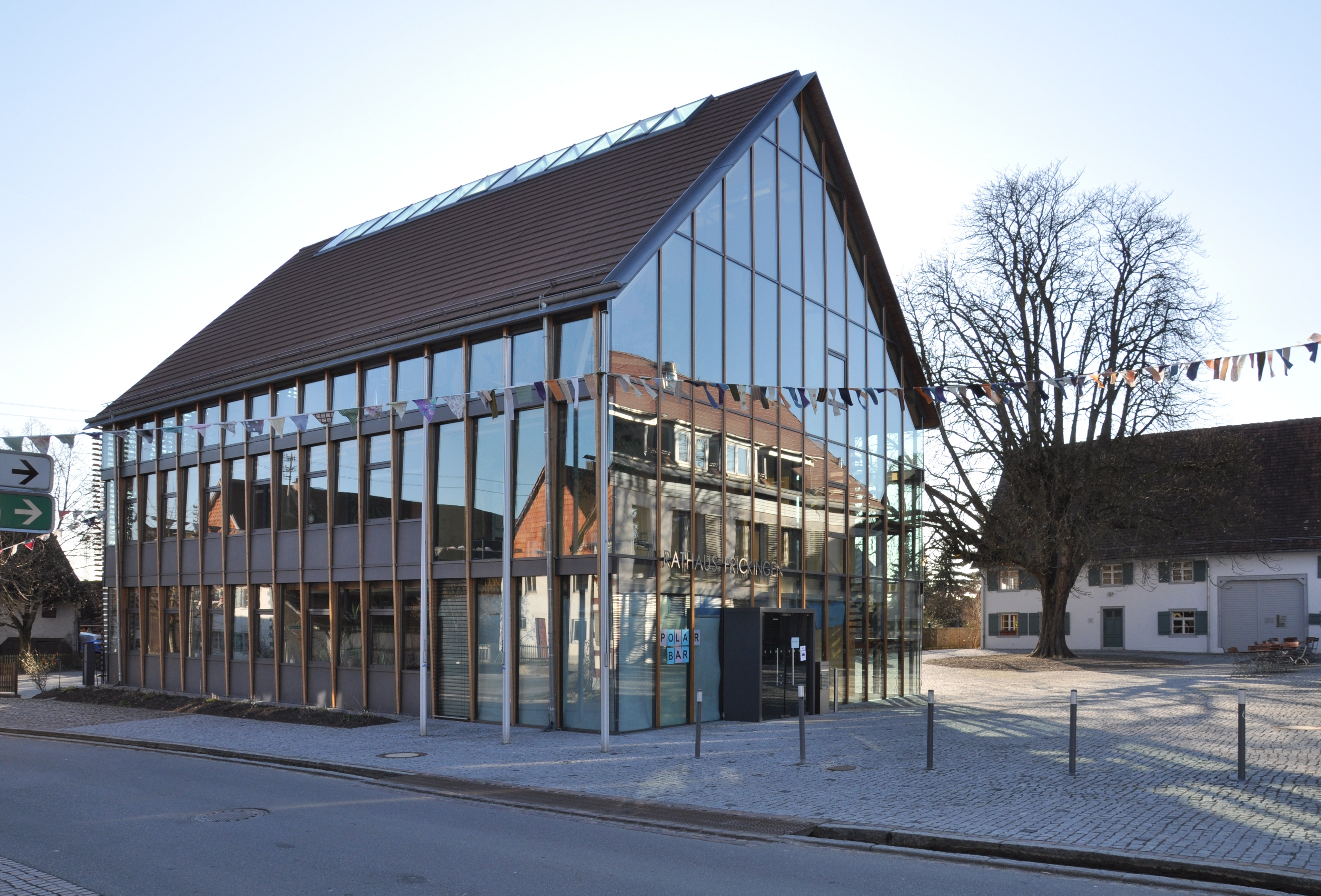 Frickingen (Bodenseekreis), Rathaus